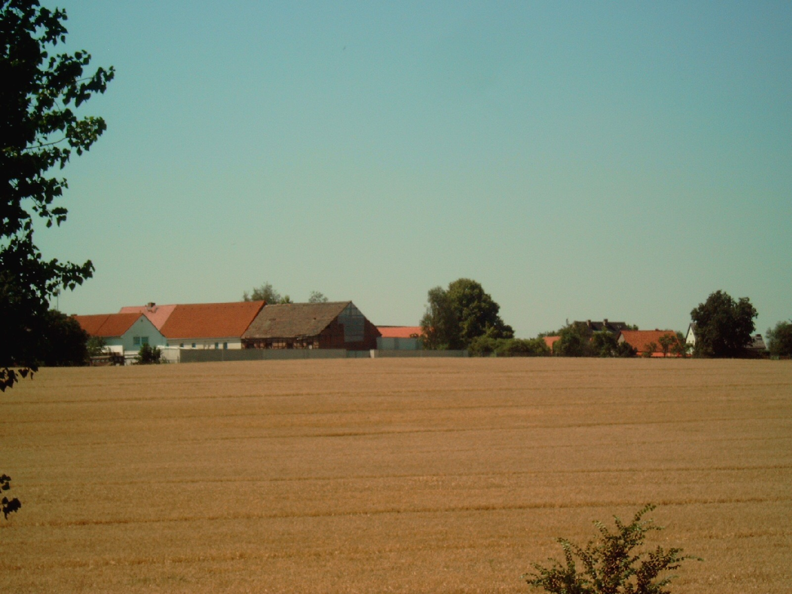 Dorf Sössen mit Felderlandschaft Urheber: selbst erstellt